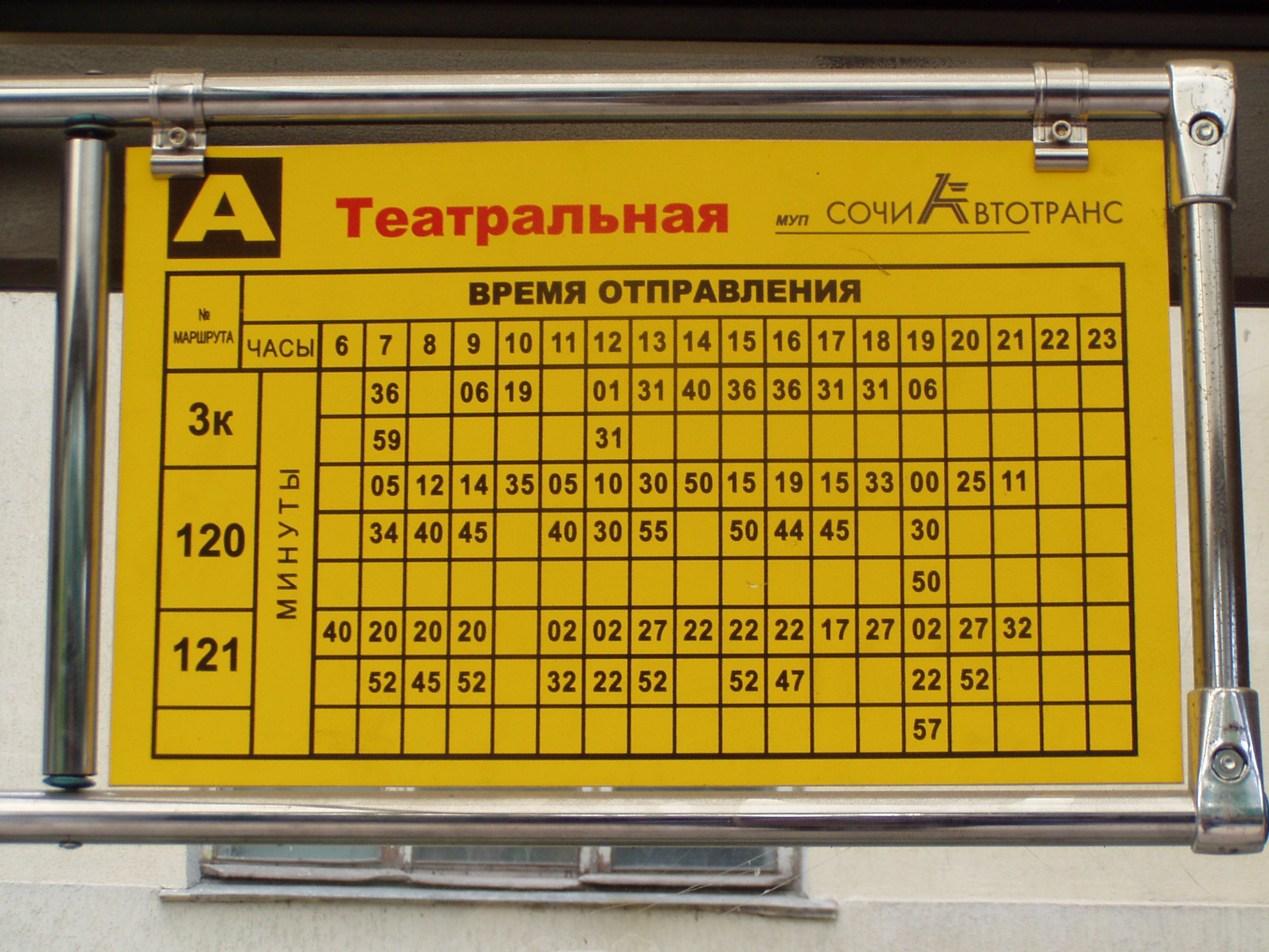 Расписание городского автобуса МУП "Сочиавтотранс".